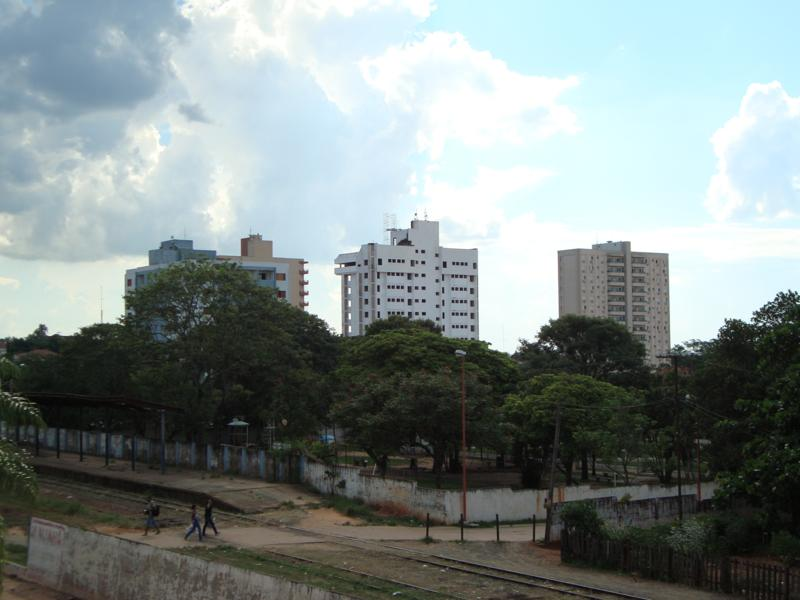 Vista da área central de Presidente Venceslau, com a antiga estação ferroviária em primeiro plano